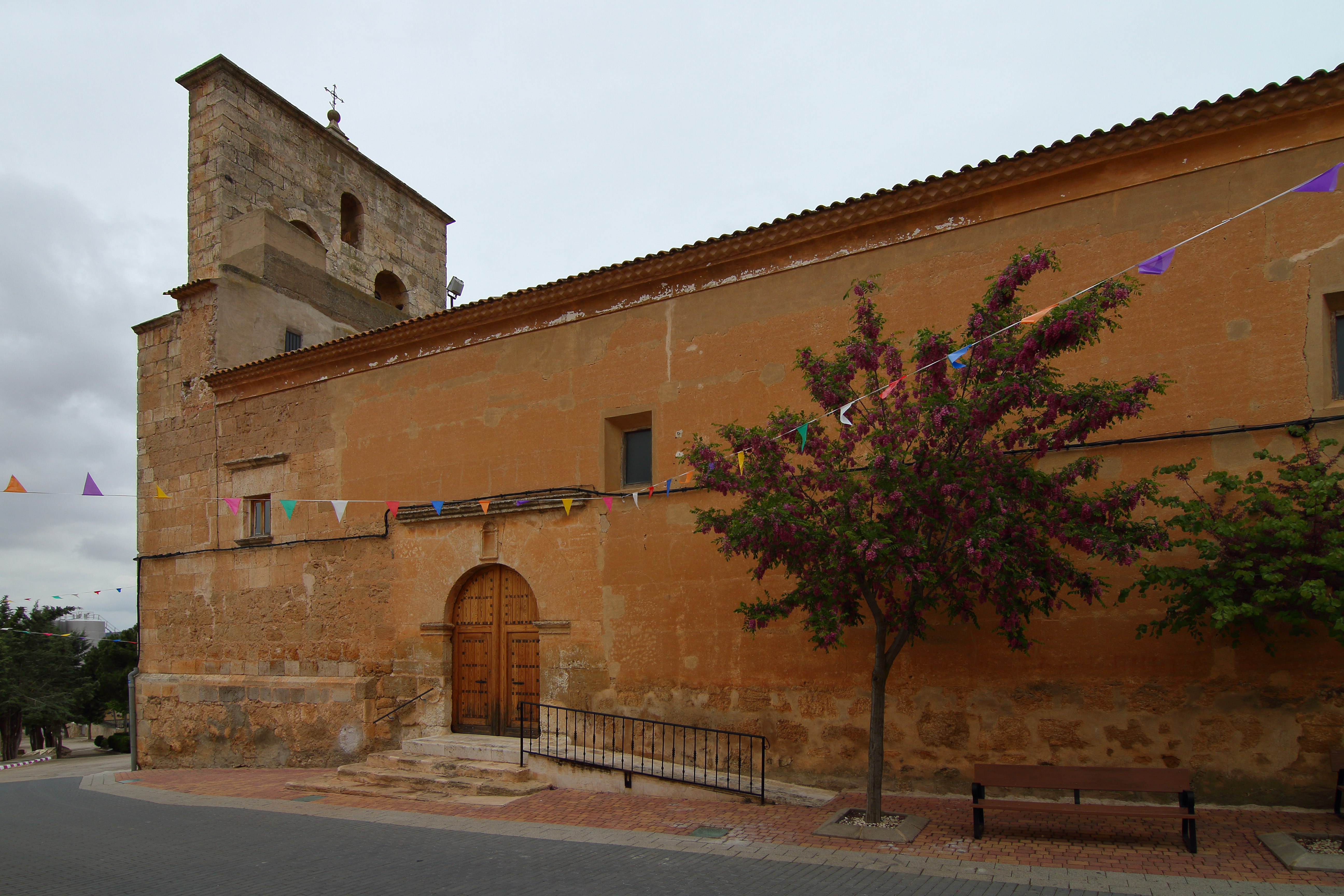 Graja de Iniesta, Iglesia parroquial